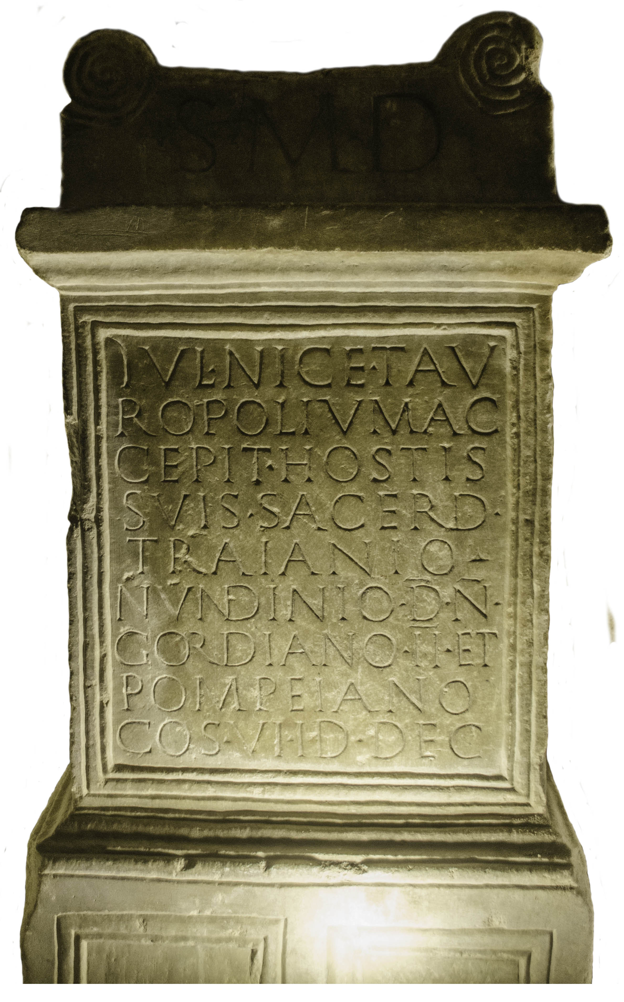 Autel taurobolique de Iulia Nice, 241 ap. JC, marbre, CIL XIII, 514. Musée Eugène-Camoreyt de Lectoure, Gers, France.